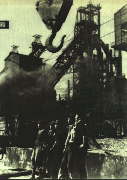 1950年的鞍山钢铁公司，1950年7月的《人民画报》。